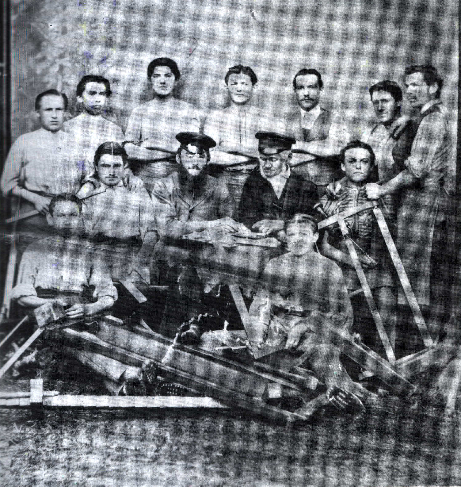 Schreiner in Eschelbronn, Adam Kaiser und Gesellen (1882) v.l.n.r. & oben nach unten: Konrad Grab, Johann Rumig, ? Kirsch, Adam Kaltenbrunner, Christian Wolff, Adam Lenz, Jacob Steiß, Christoph Canz, Adam Kaiser jun., Adam Kaiser sen., Georg Wilhlm Kirsch, Wilhelm Echner, Johannes Filsinger.